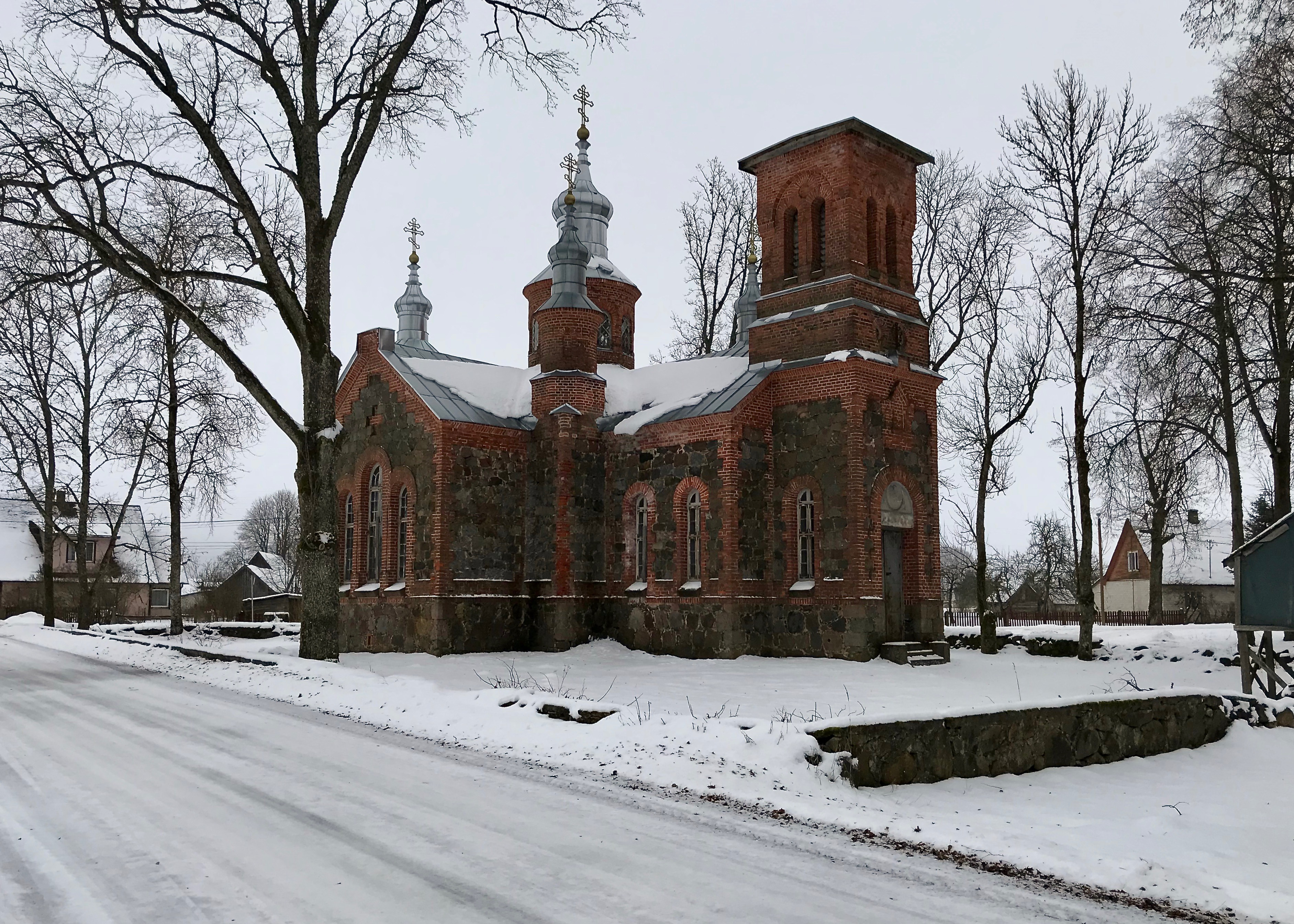 Priipalu Püha Vassilius Suure kirik (2018)